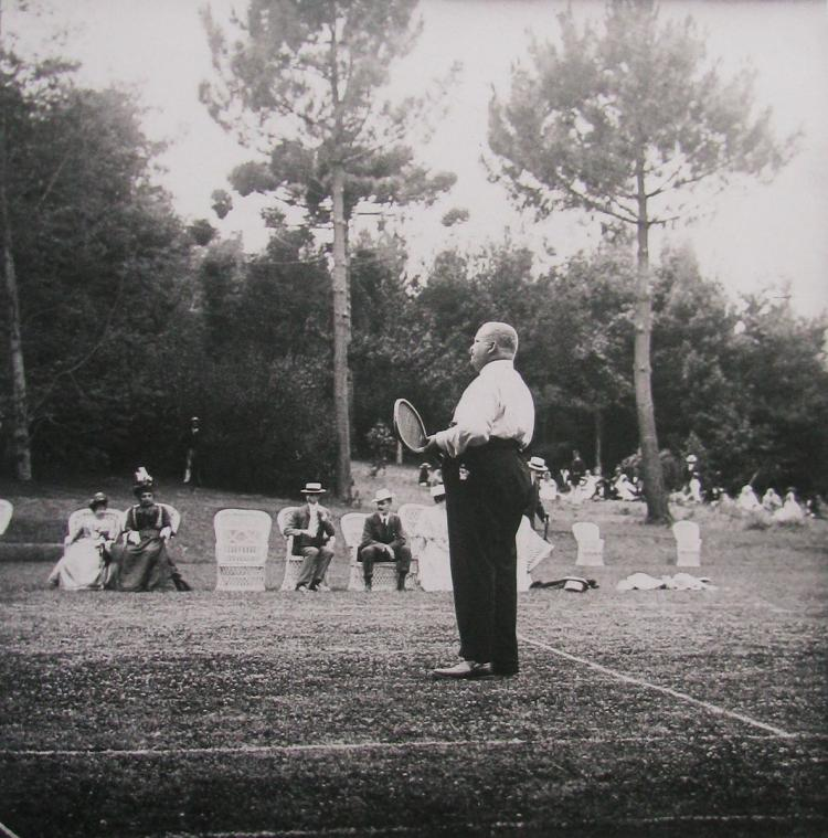 D. Carlos numa partida de ténis na Quinta do Palheiro durante a Visita Régia. Photographia-Museu Vicentes (S / N.º), Funchal, ilha da Madeira Pub. catálogo da exposição Obras de Referência dos Museus da Madeira.500 Anos de História de Um Arquipélago, mostra comissariada por Francisco Clode de Sousa, Galeria de D. Luís, Palácio da Ajuda, Novembro de 2009, p. 477.